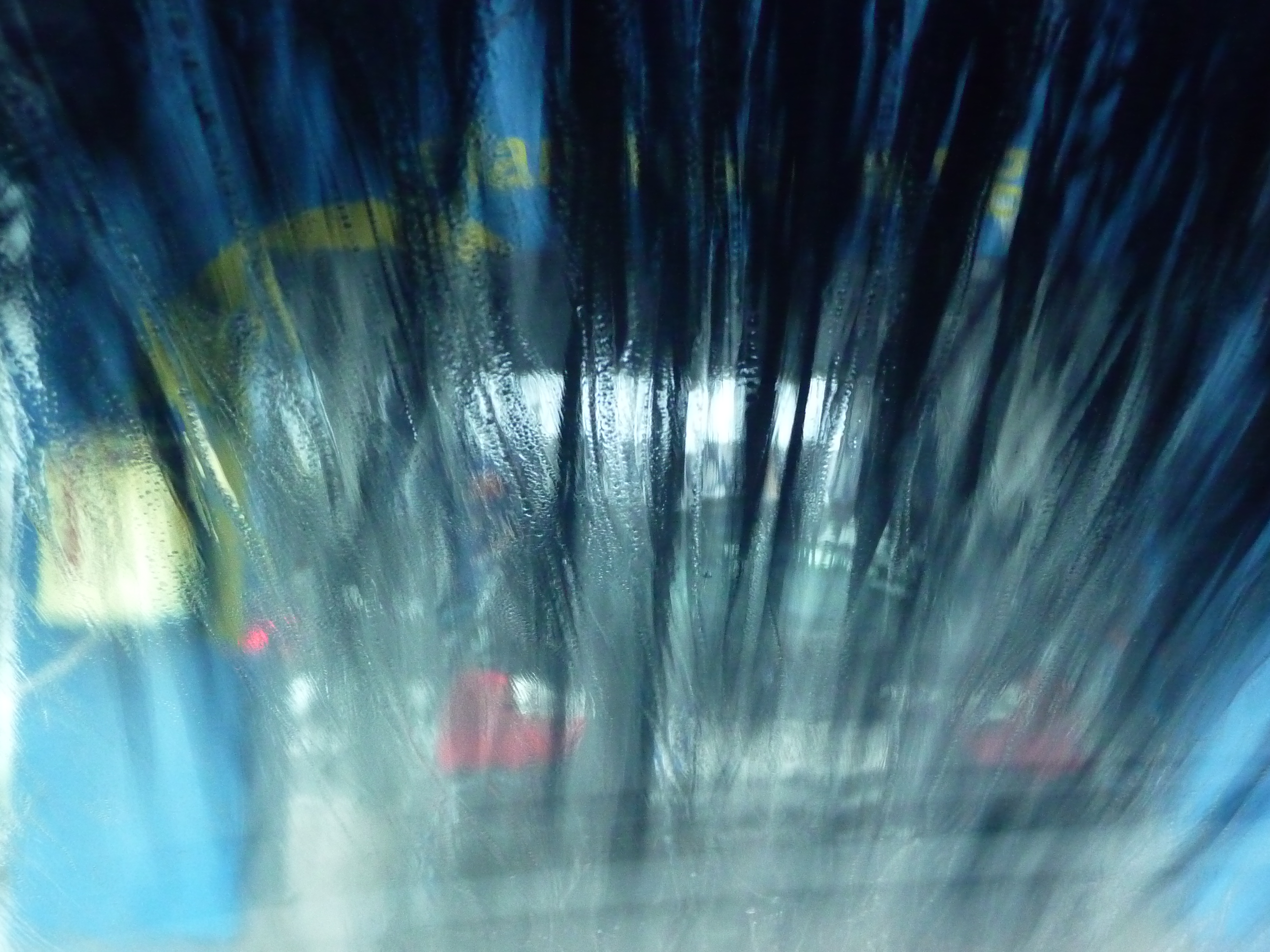 Programm Bürstenwäsche in einer Autowaschstraße (fotografiert vom Innenraum des Fahrzeugs)